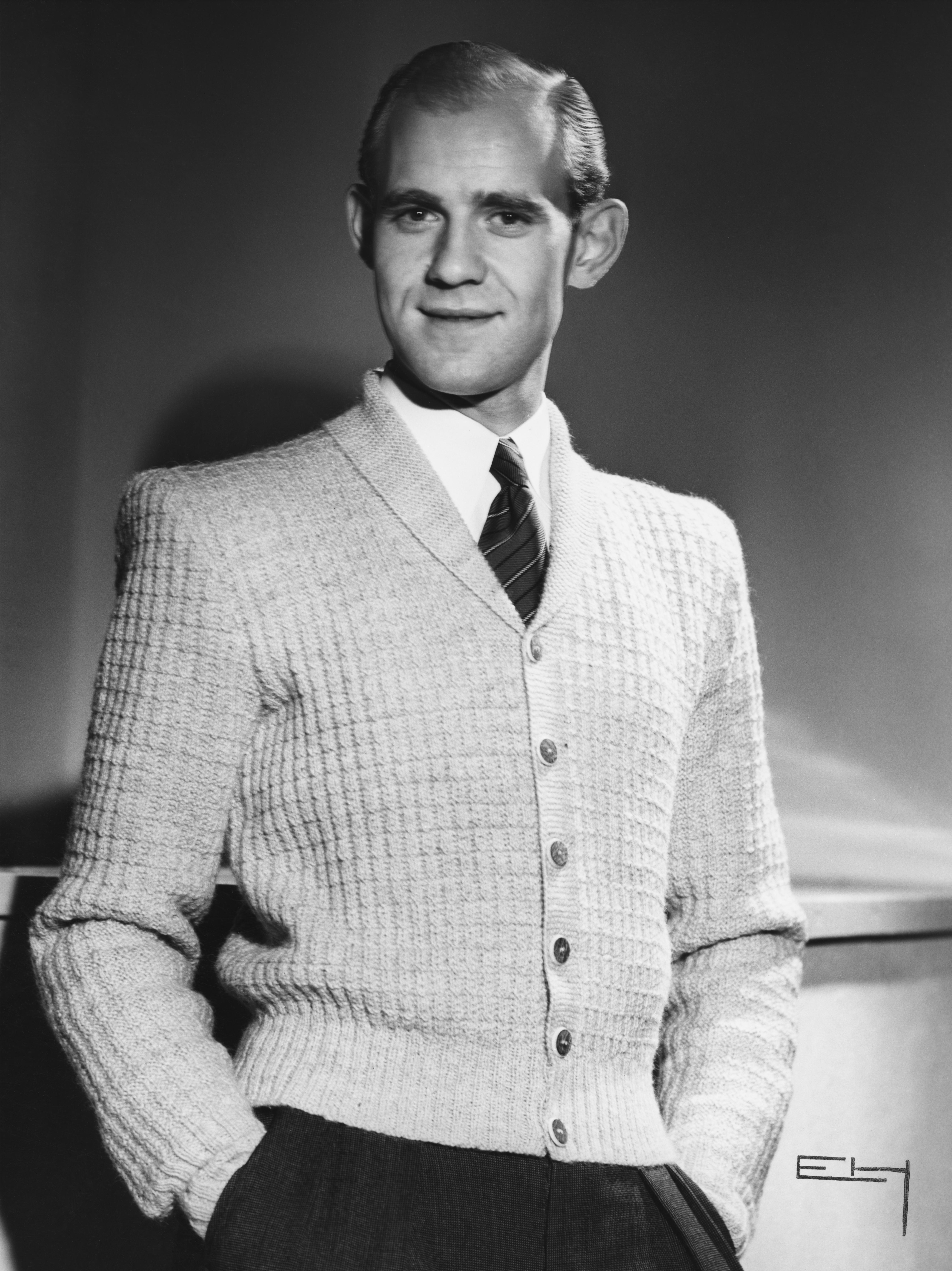 Manlig modell visar stickat från Nordiska Kompaniets herrkonfektion. Ämnesord: Kläder, Man, Mode.